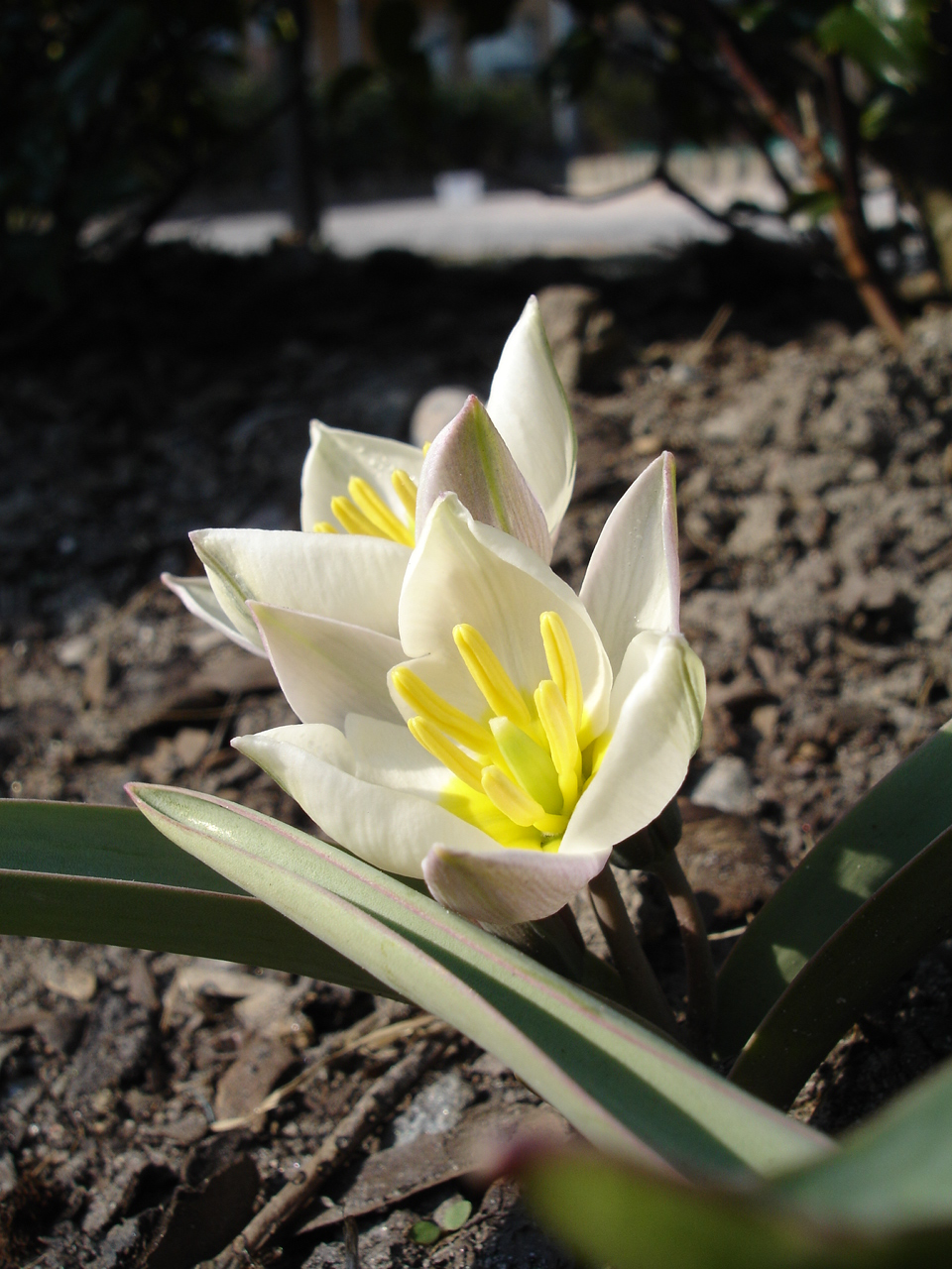 Tulipa biflora (syn. Tulipa polychroma)